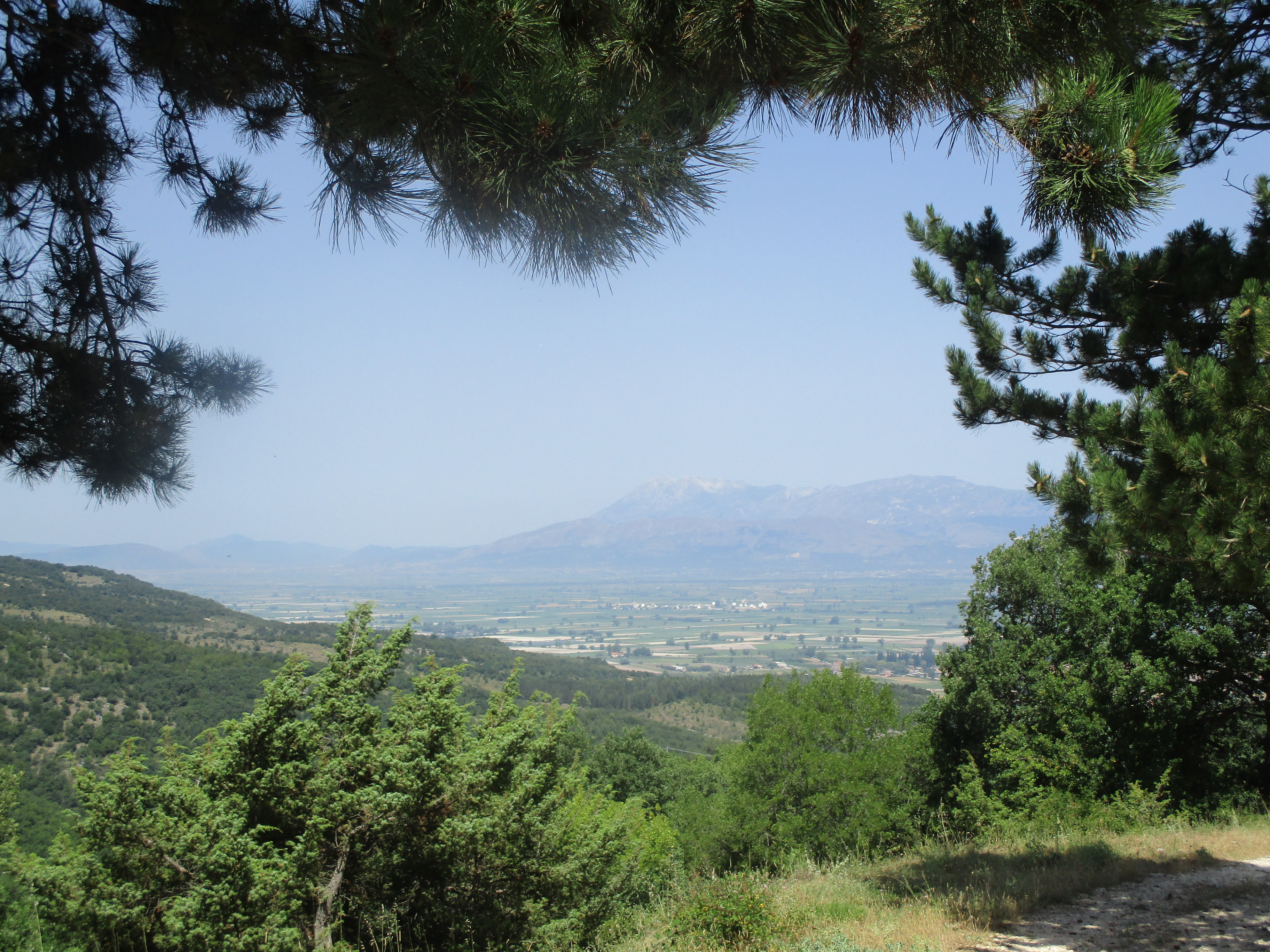 Veduta sulla piana del Fucino